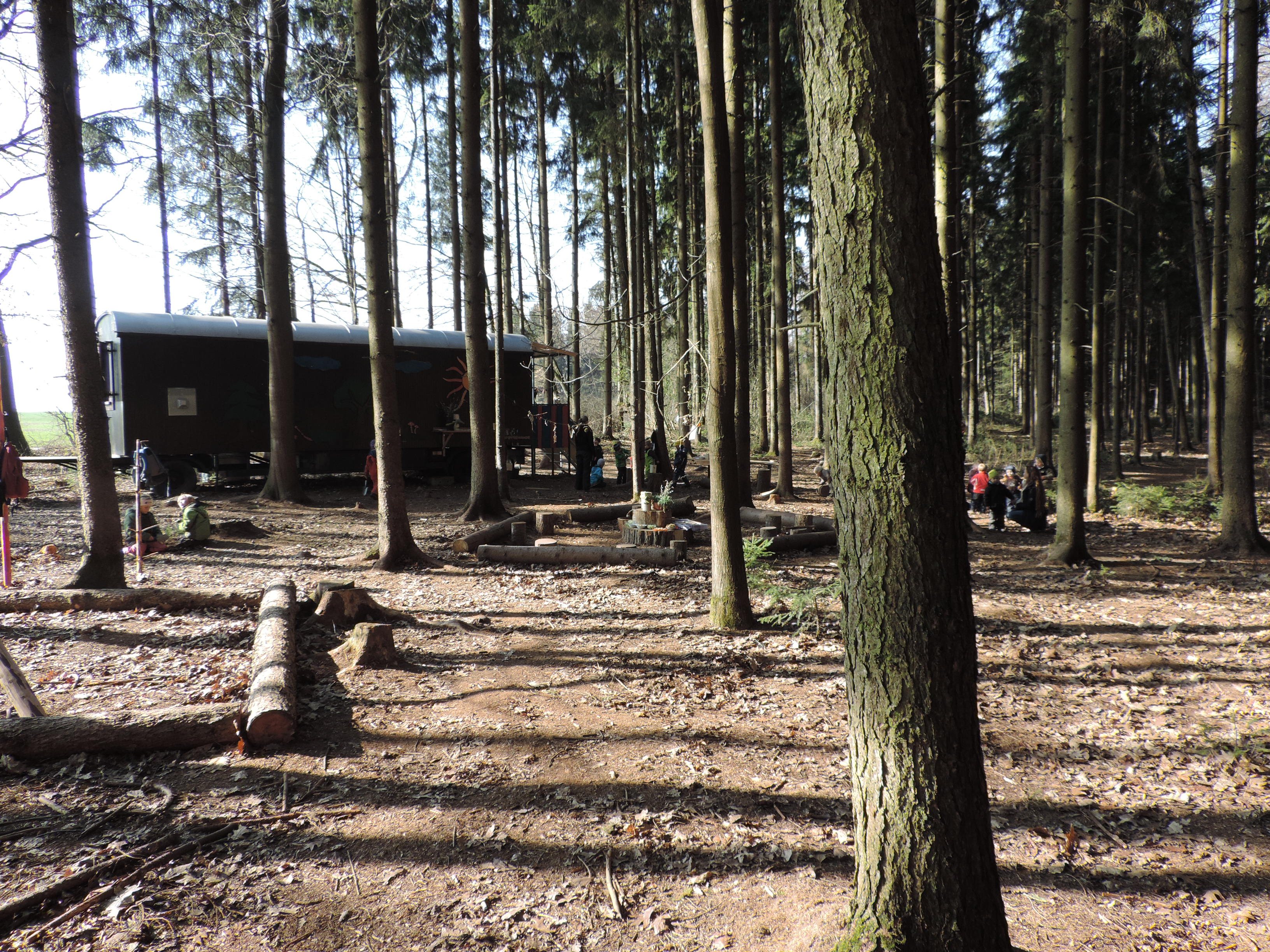 Template:Montessori-Waldkindergarten Wertingen